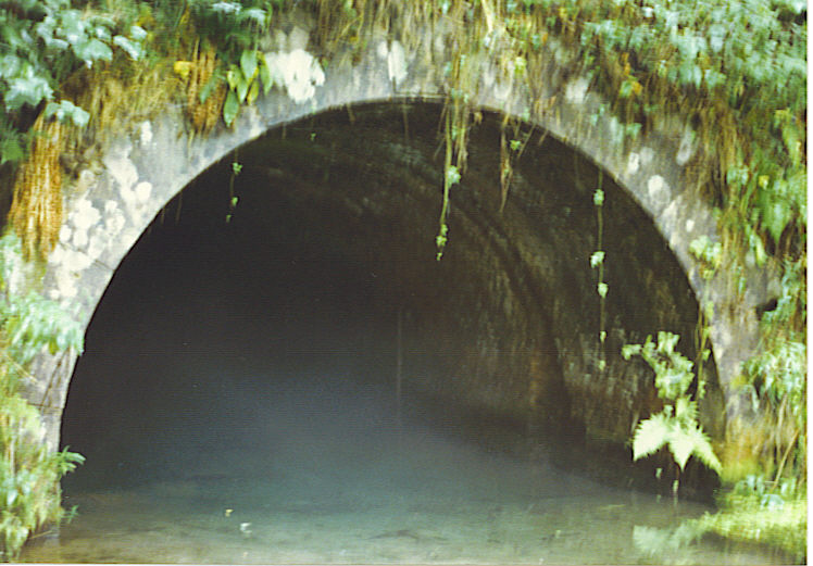 Tunnelingang op Ourthekanaal te Bernistap